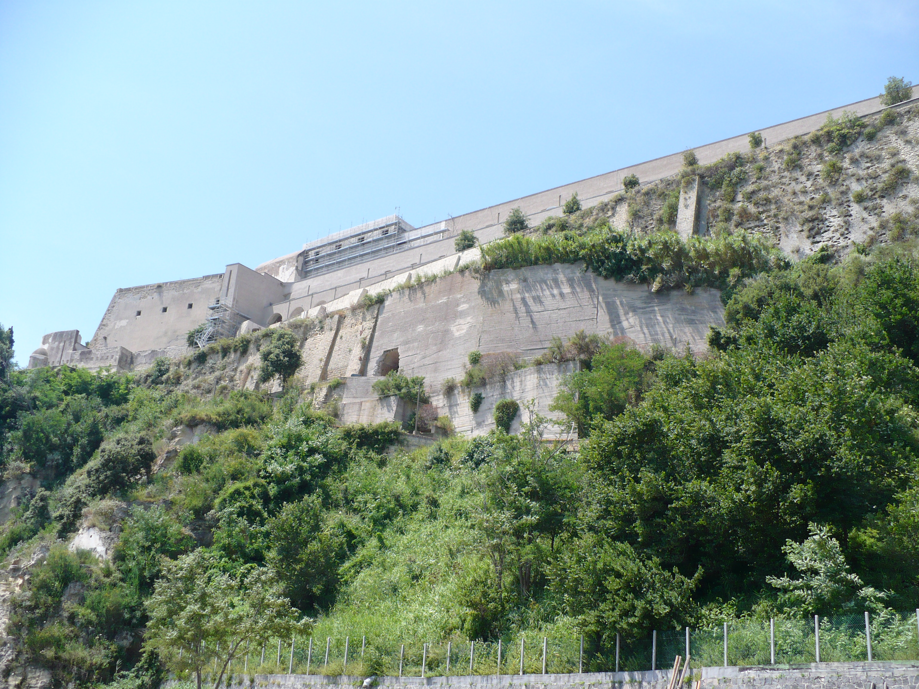 scorcio del Castello dalla spiaggetta sottostante raggiungibile unicamente via mare Autore foto: Roberto De Martino